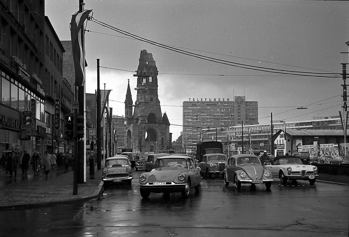 Blick von der Ecke Tauentzienstraße / Nürnberger Straße in Richtung Kaiser-Wilhelm-Gedächtniskirche in Berlin-Charlottenburg.